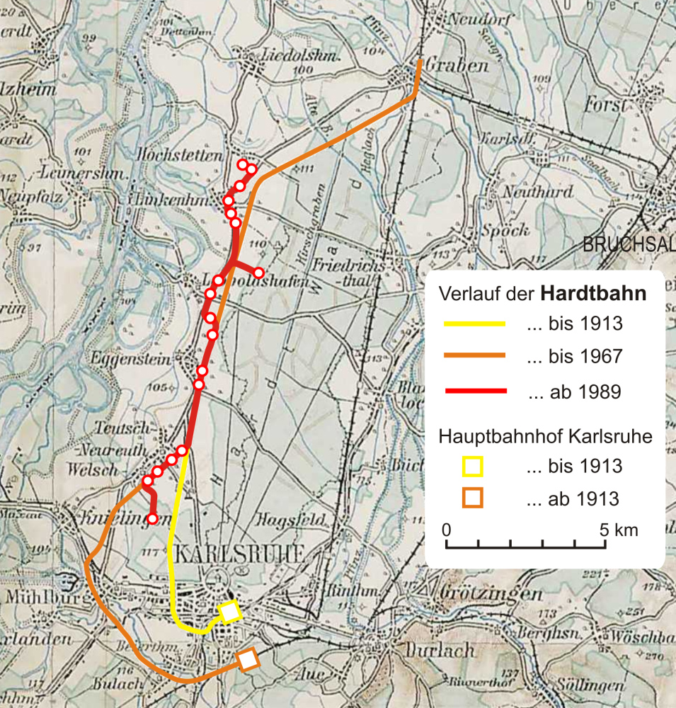 Verlauf der Hardtbahn ab 1989